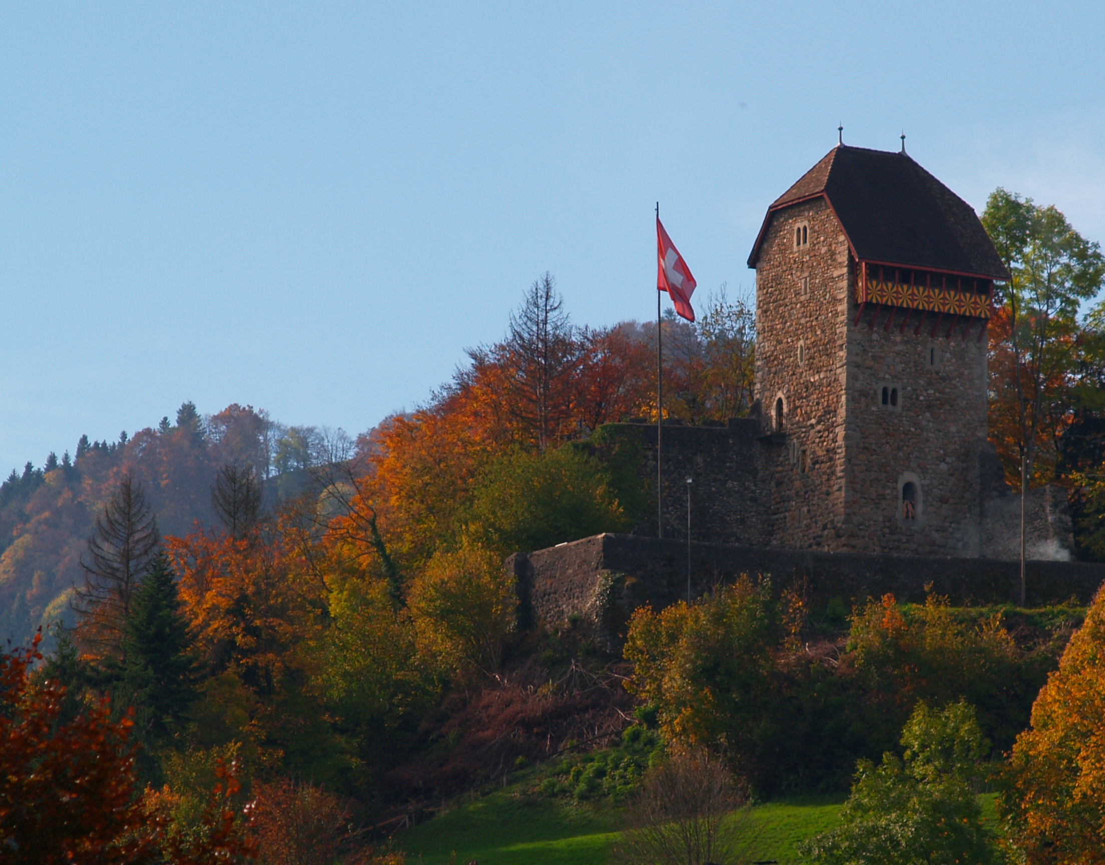 Burgruine Iberg (Yburg) in Wattwil (Schweiz)